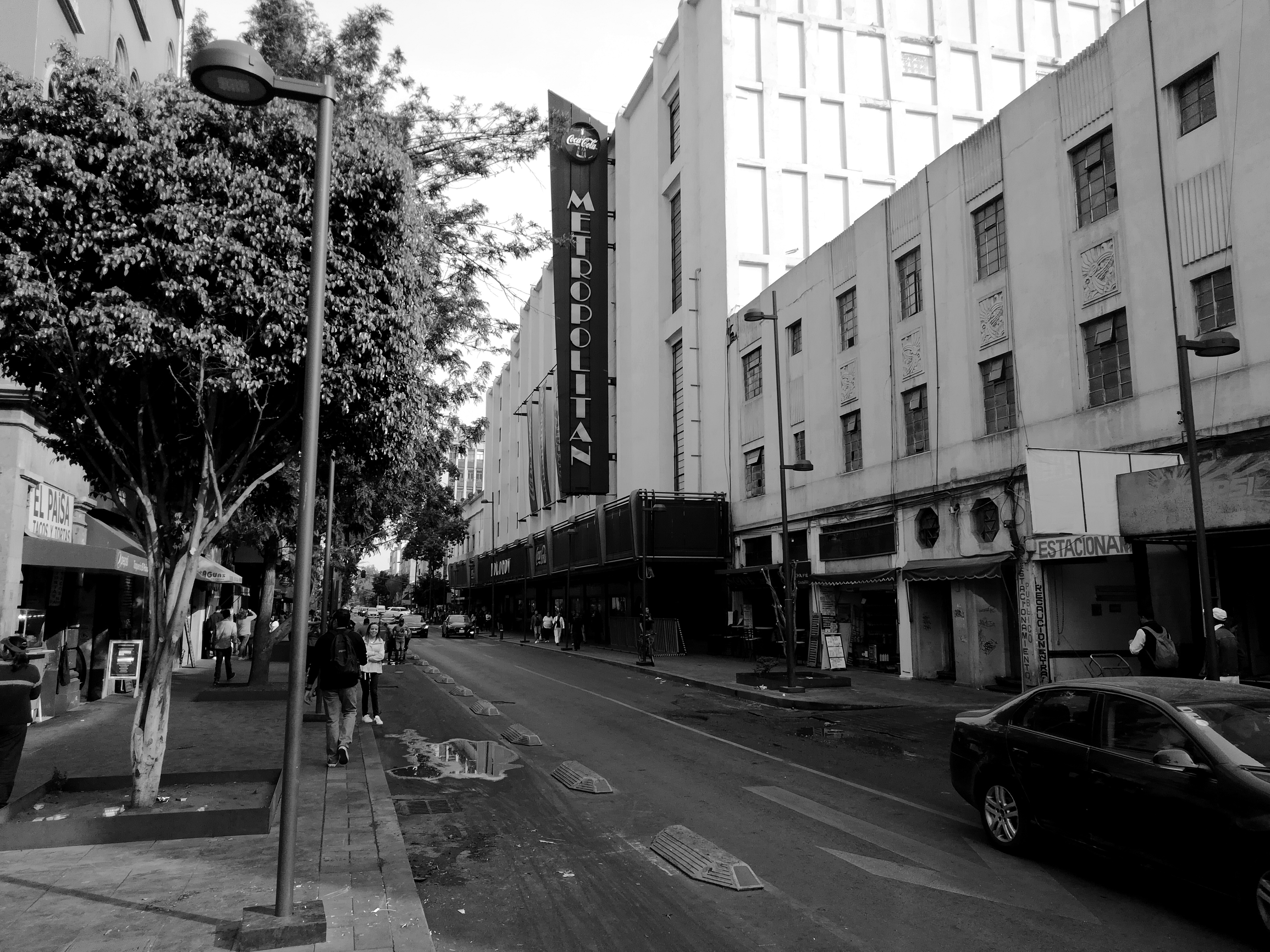 Imagen del teatro Metropolitan, calle Independencia, Ciudad de México